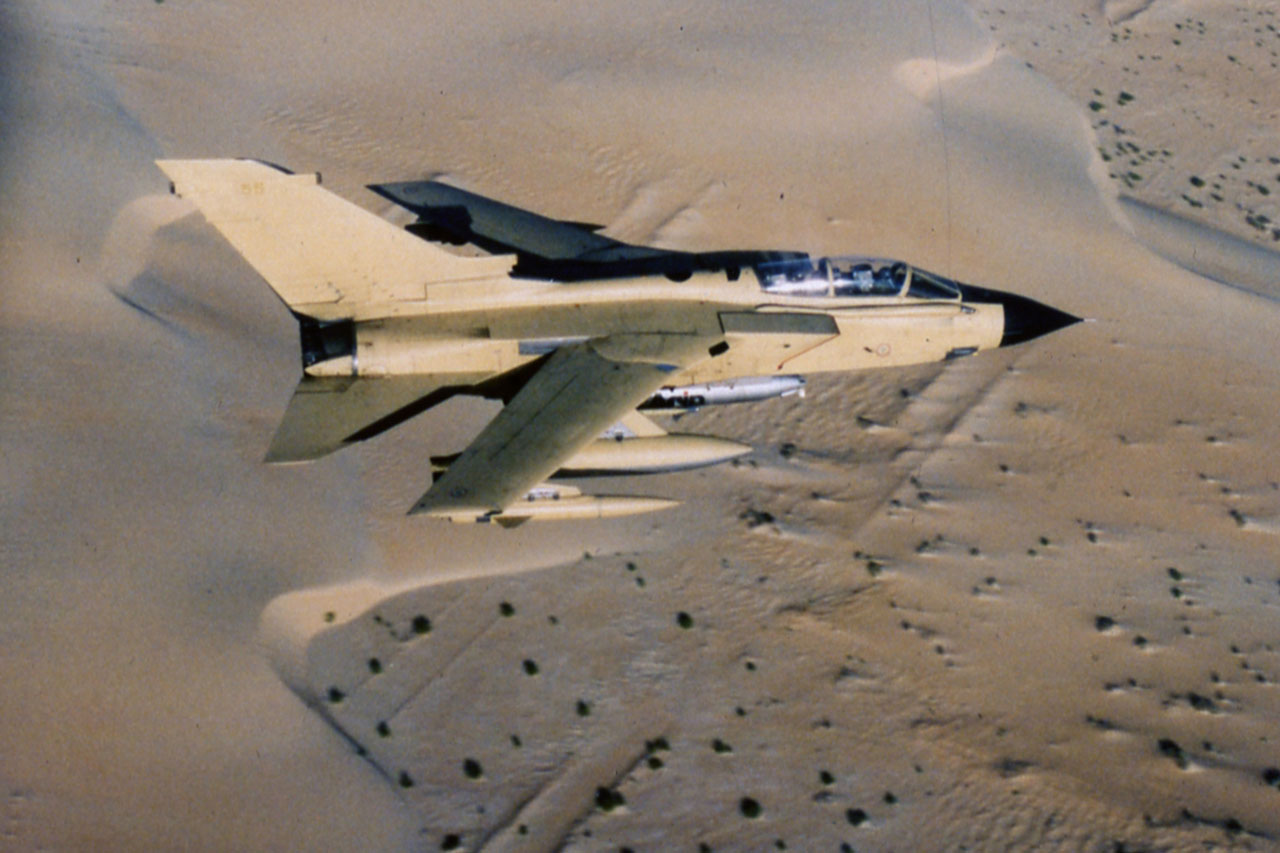 Tornado italiano in Iraq nel gennaio 1991 nell'ambito dell’Operazione Desert Storm.